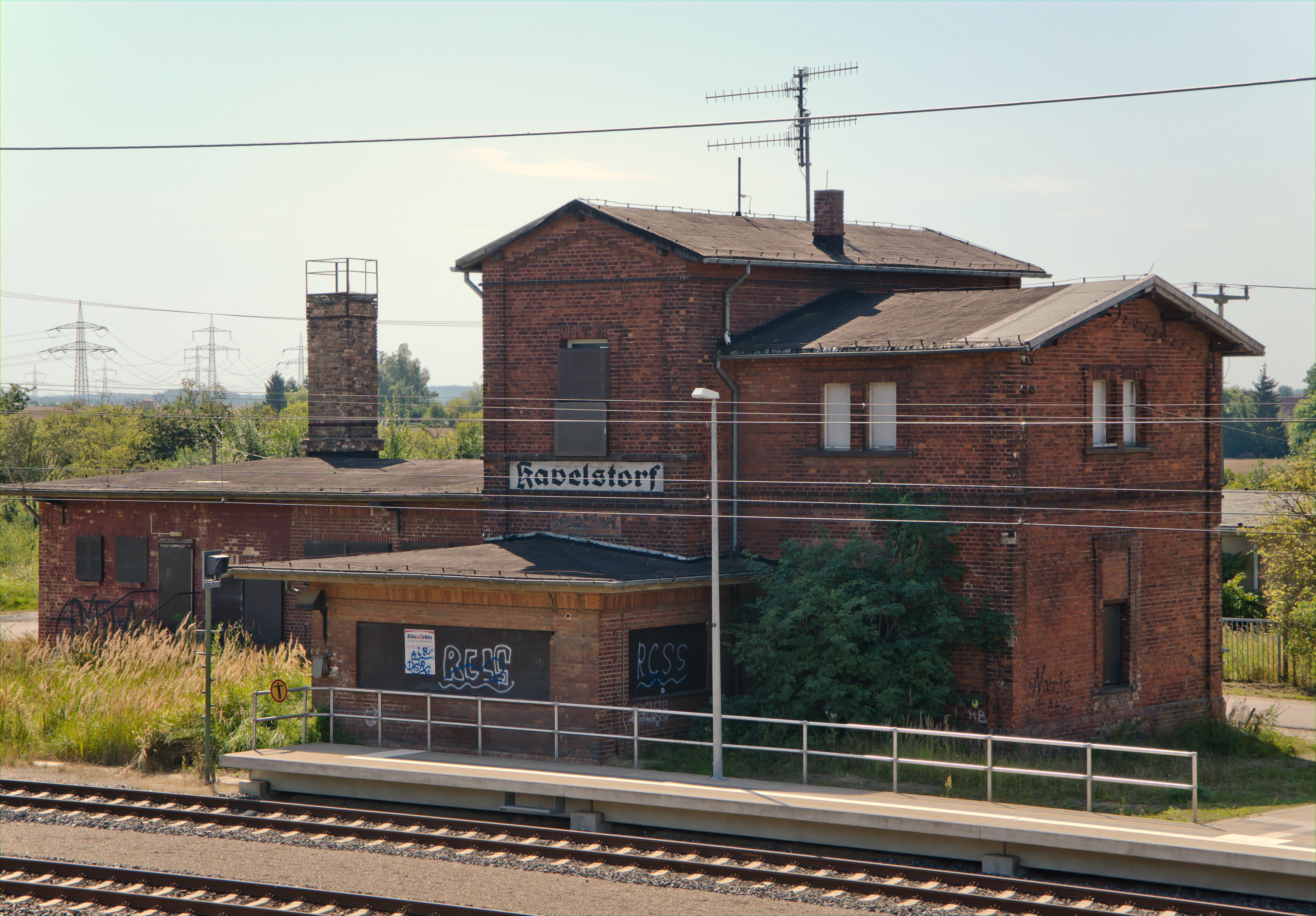 Bahnhof Kavelstorf